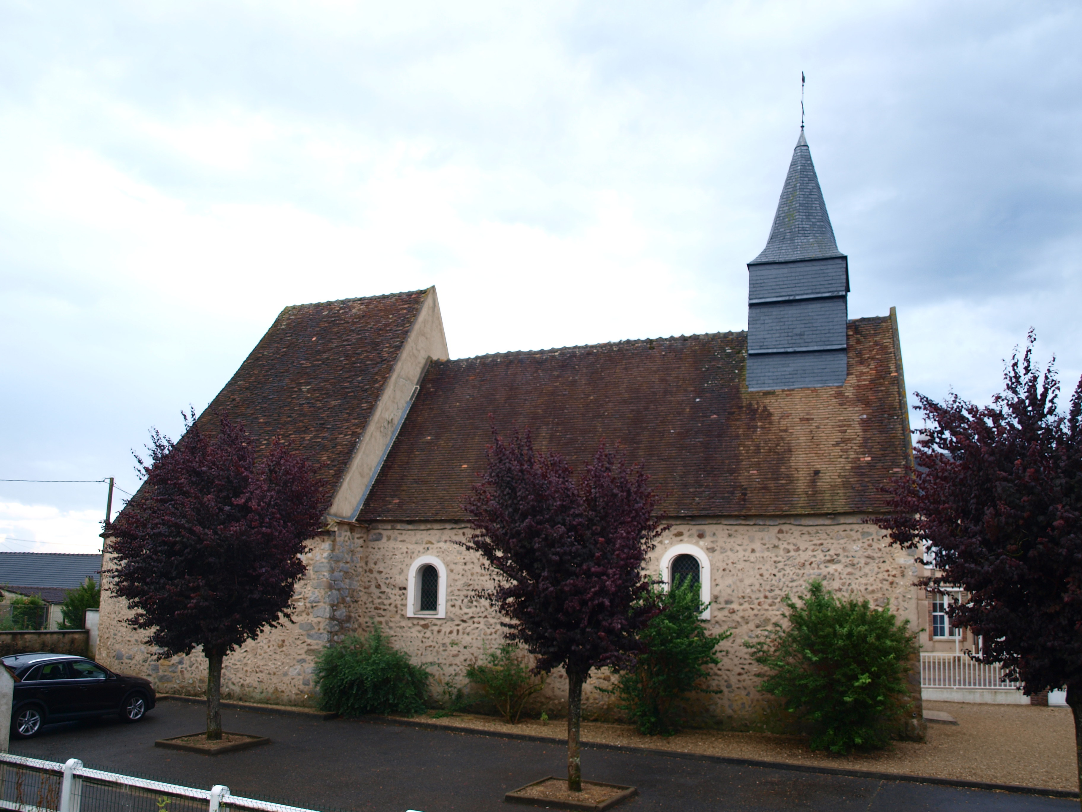 Cuy (Yonne, France) ; église